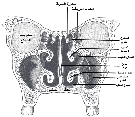 مقطع إكليلي في جوف الأنف. مقطع جبهي في جوفي الأنف. تم --Tarawneh 19:35، 12 فبراير 2008 (UTC).